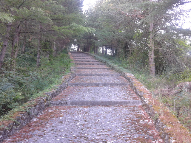 Viale che conduce alla torre di San Berardo